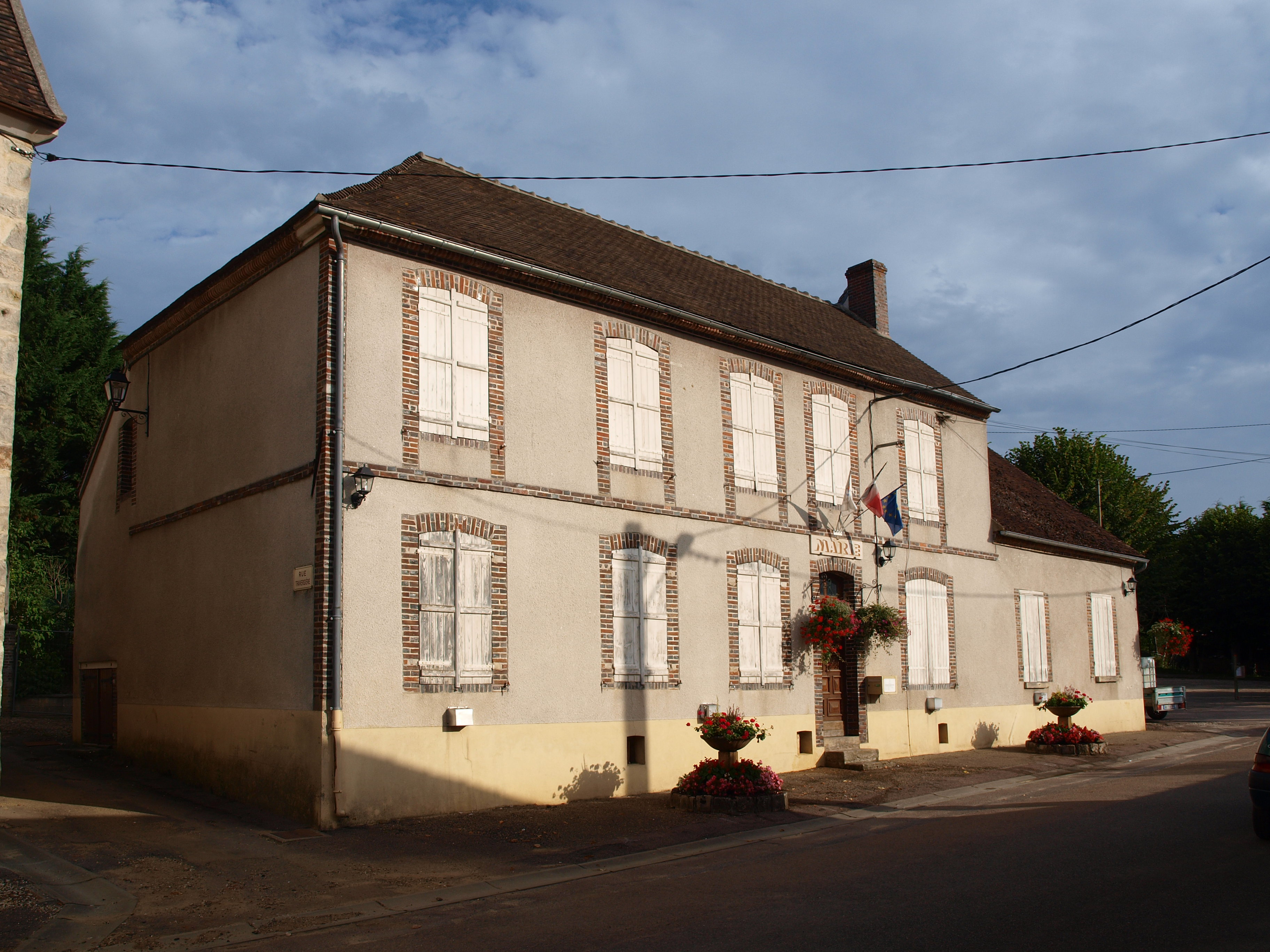 Villecien (Yonne, France) ; mairie